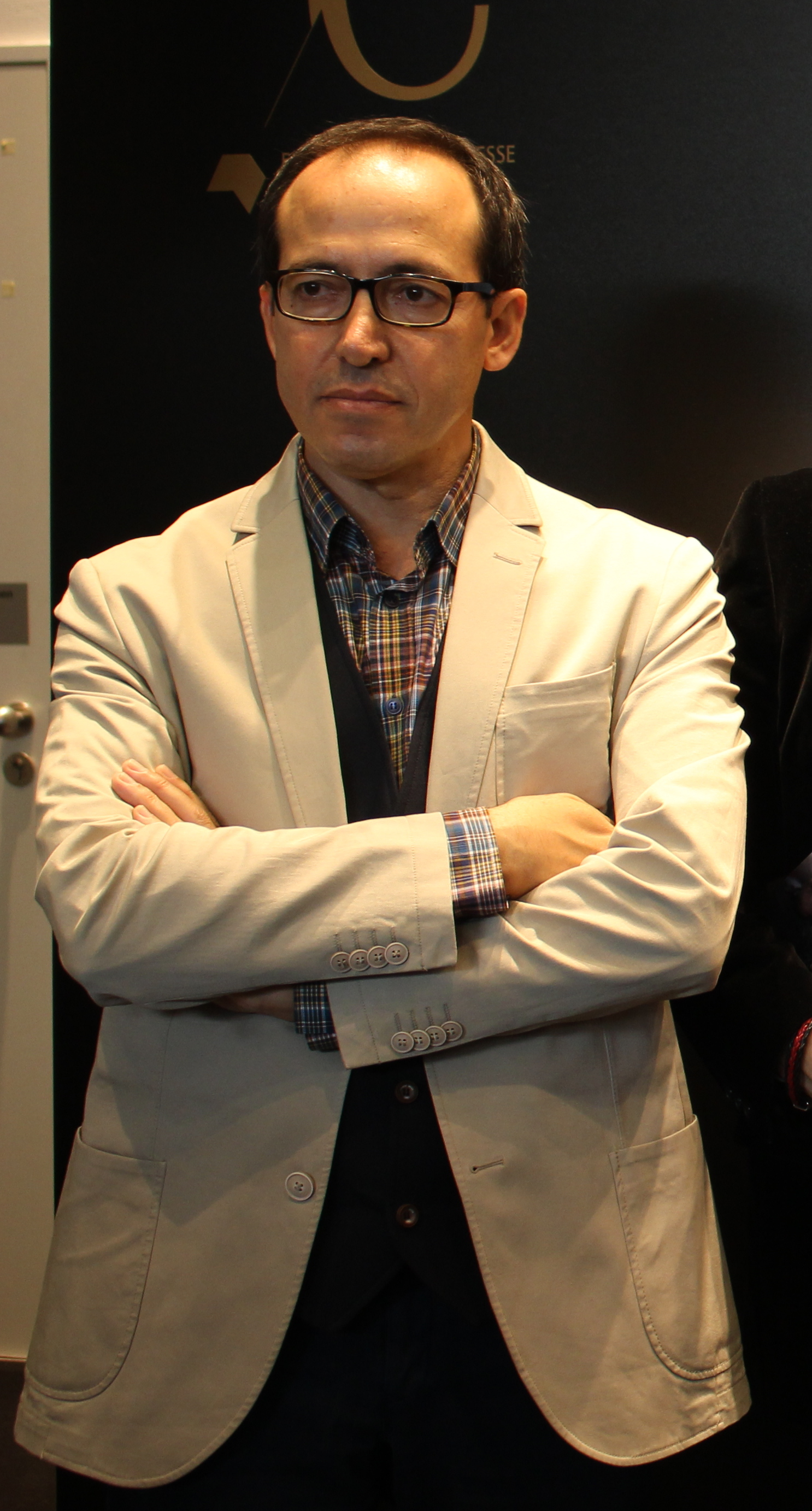 Burhan Sönmez, Can Dündar, Asli Erdogan, Juergen Boos - Foire du Livre de Francfort 2017